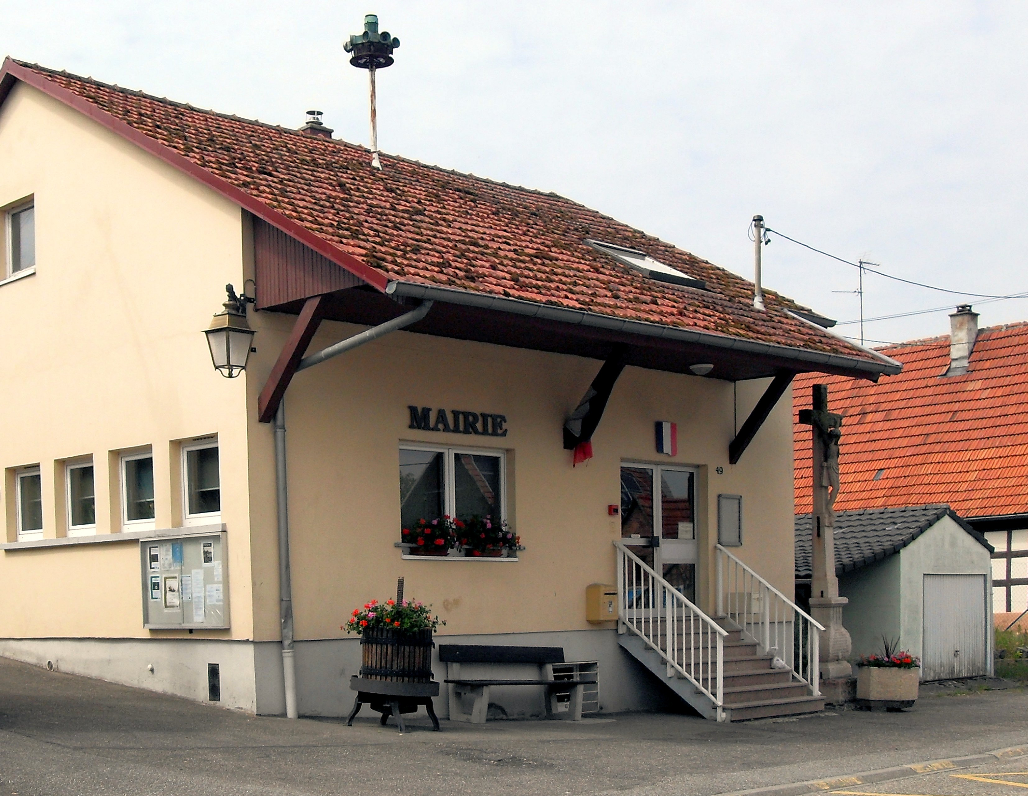 La mairie d'Eberbach-Seltz